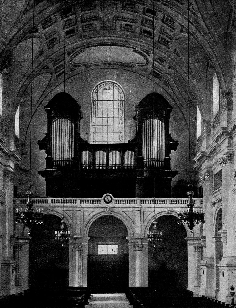 Orgel von St. Margaret in München 1915 (Bild aus: Musica Sacra Bd. 48, 1915, S. 173)